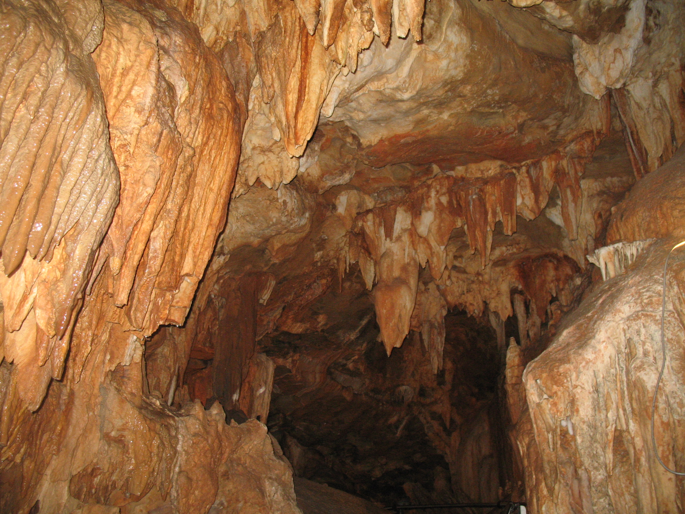 Grotte di Toirano, a Toirano, Savona, Liguria, Italia